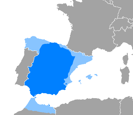 Onde ye mayoritariu Onde ye minoritariu o convive con otres llingües